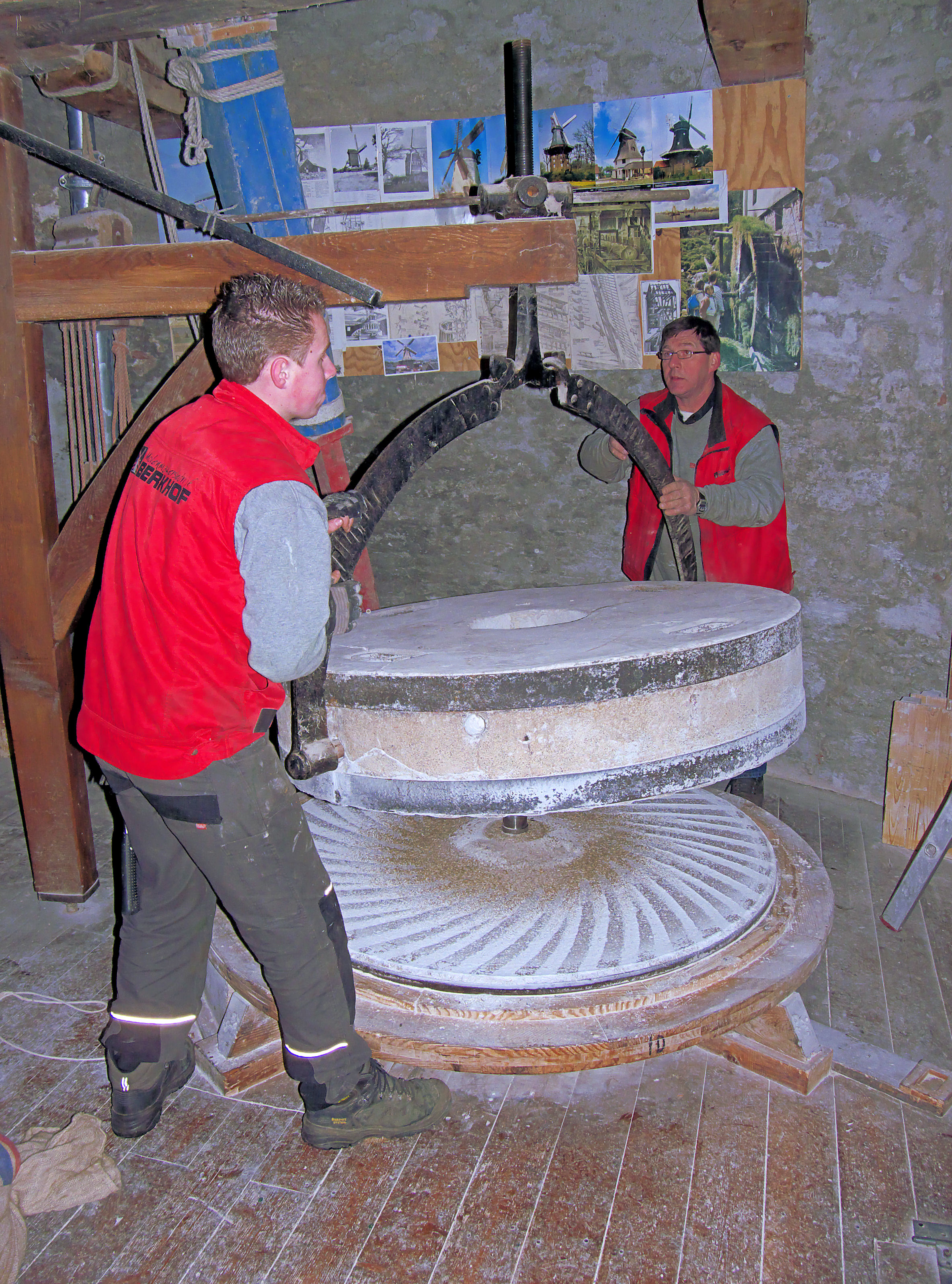 Molen De Hoop, Garderen, openleggen maalkoppel